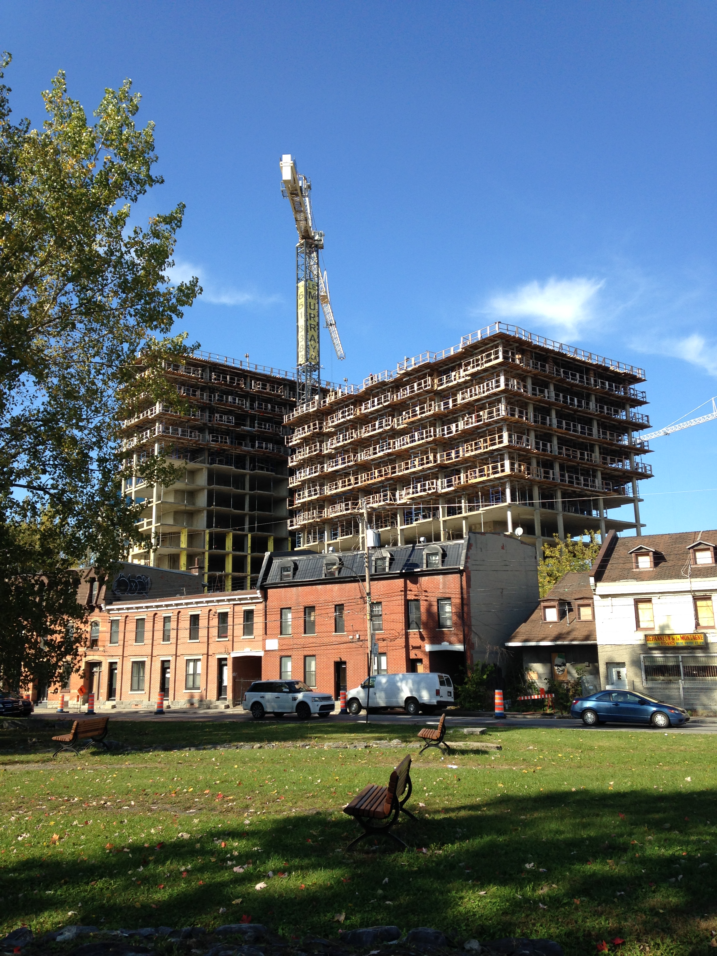 Le Murray